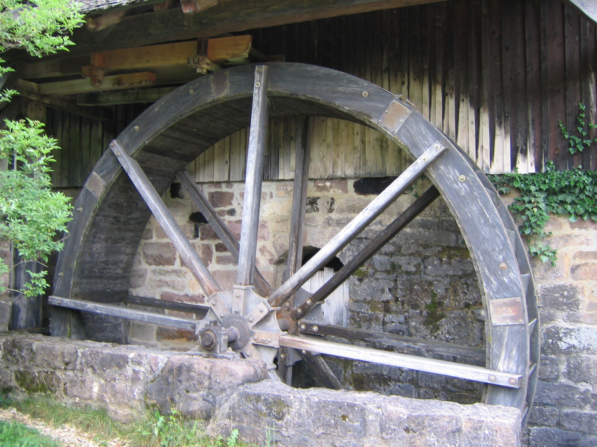 Wasserrad im Freilichtmuseum Neuhausen ob Eck.Es enthält 80 Taschen und der Durchmesser beträgt 5,40m.